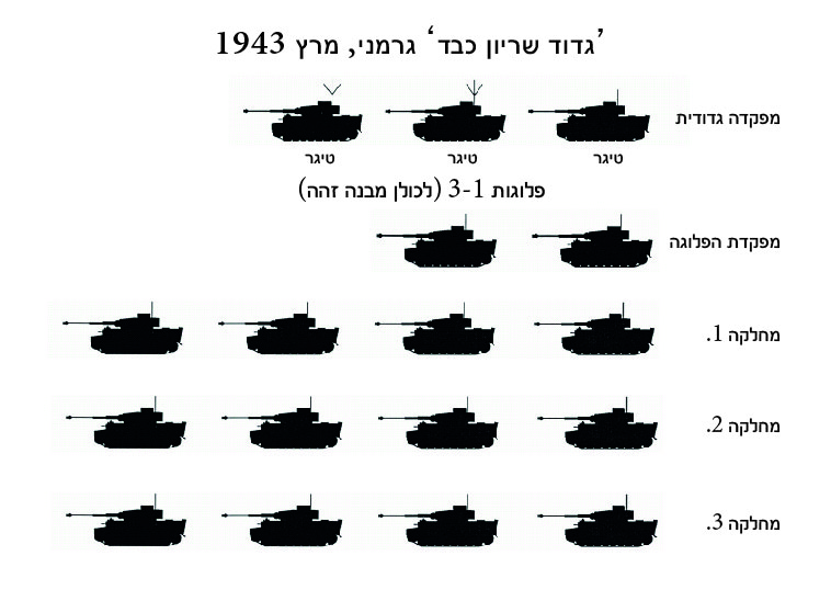 גדוד שריון כבד טיגר